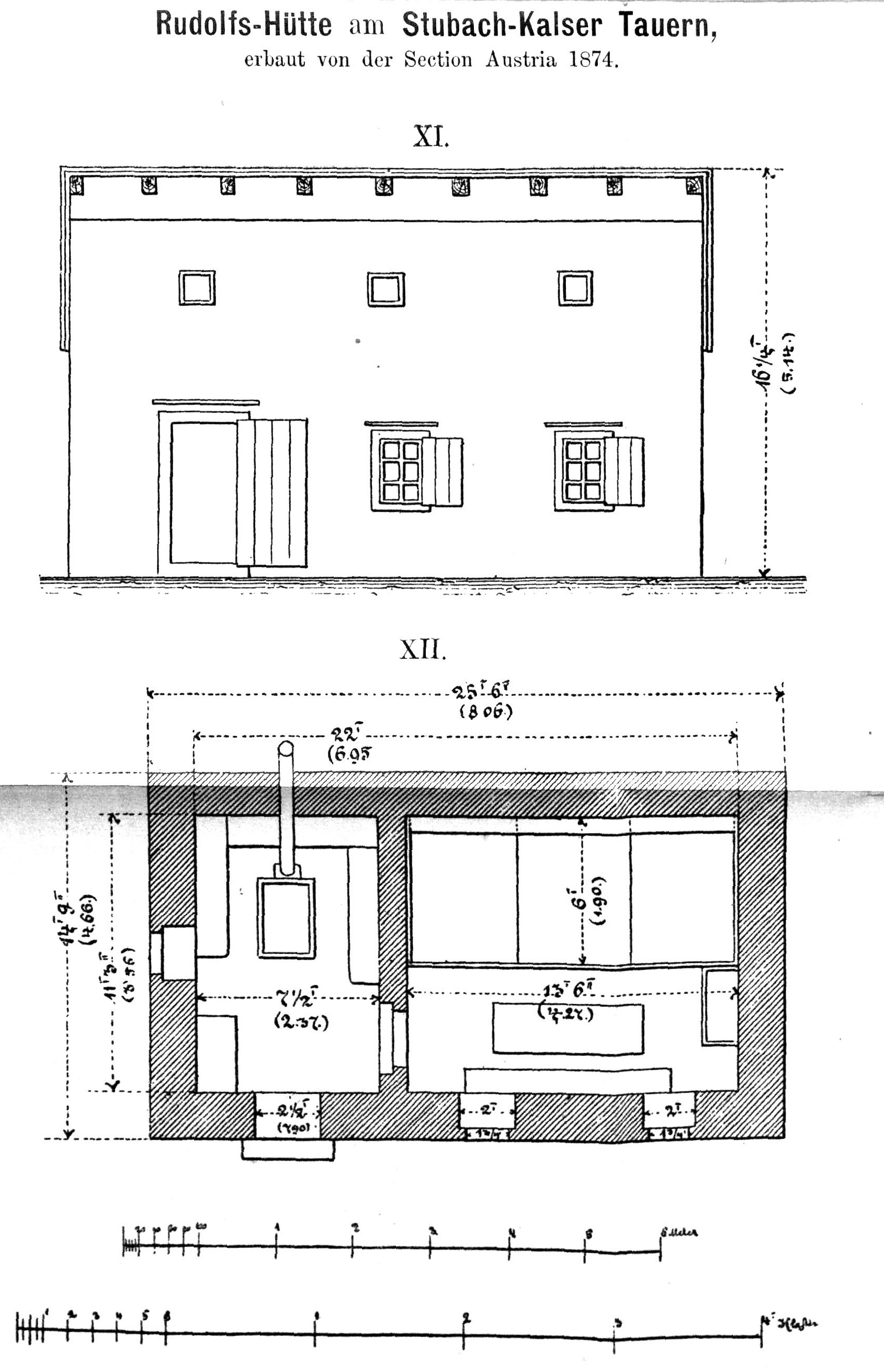 Entwurfszeichnung der Rudolfs-Hütte aus Zeitschrift des Deutschen und Österreichischen Alpenvereins Bd.08 (1877)